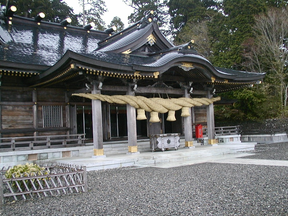 Honden of Akiha Hongu Akiha Janja, in Hamamatsu, Shizuoka, Japan